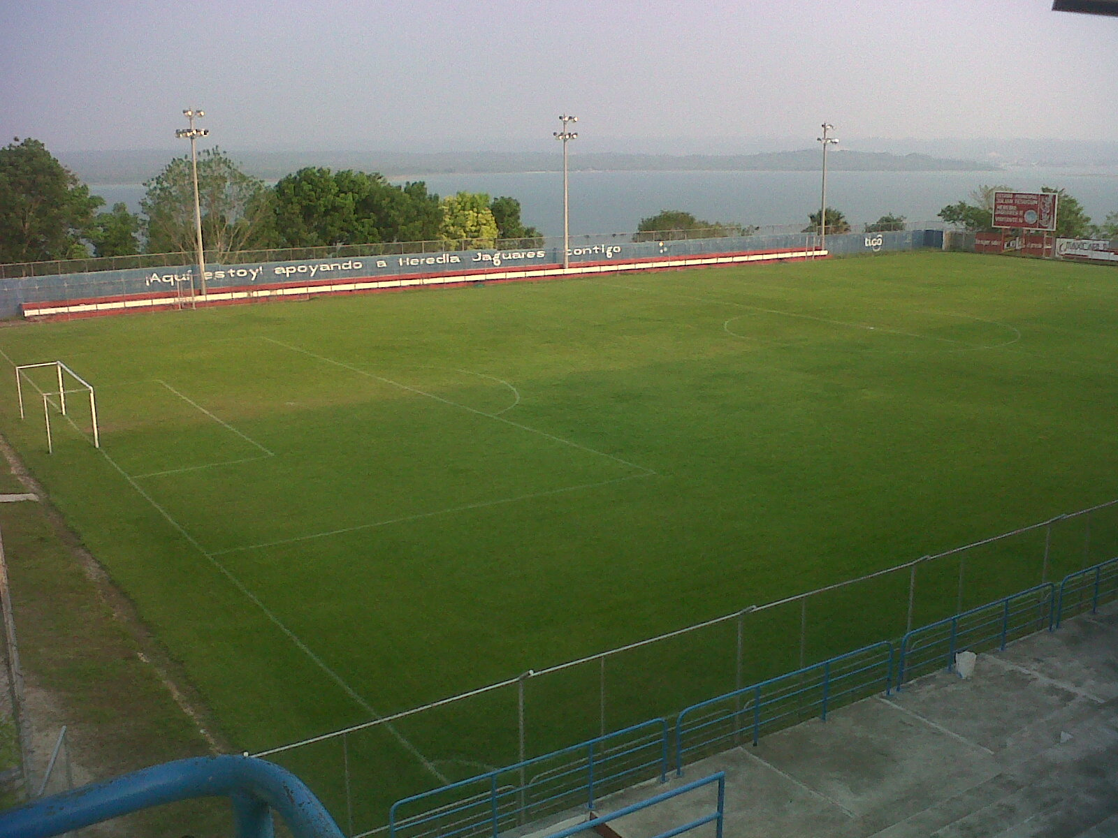 Vista del Estadio desde la entrada principal, al fondo se encuentra el lago Petén Itza.